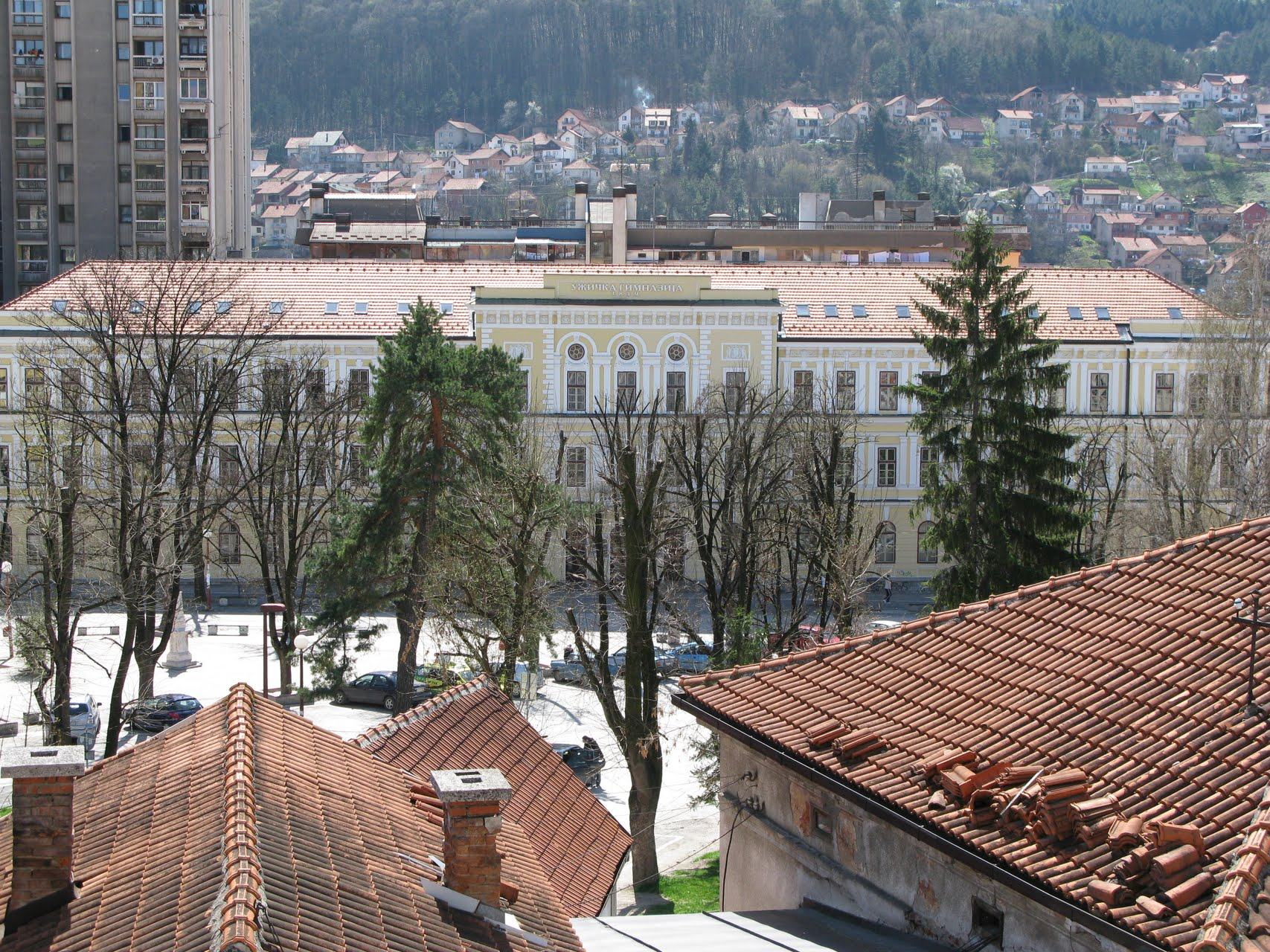 Budova gymnázia v Užicích, Srbsko